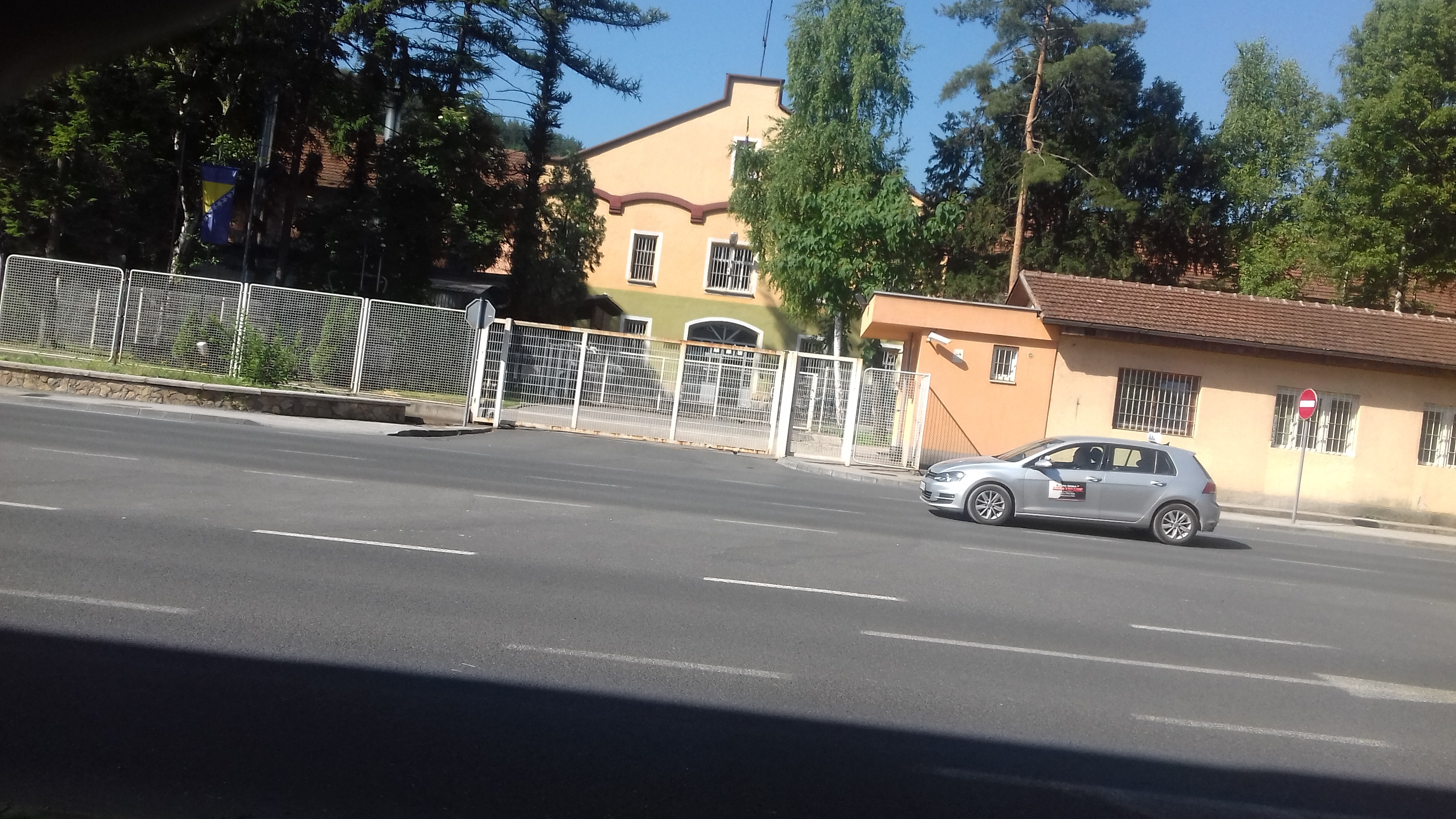 Главни улаз у Казнено-поправни дом Зеница у Сарајевској улици (фотографија је направљена из даљине јер је детаљно фотографисање овог затвора иначе законом БиХ забрањено, осим за специјалне ТВ емисије као што је нпр. Случајеви икс на Хајат ТВ-у)